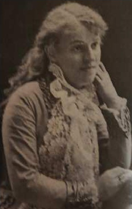 Ludvika Rottová, česká divadelní herečka